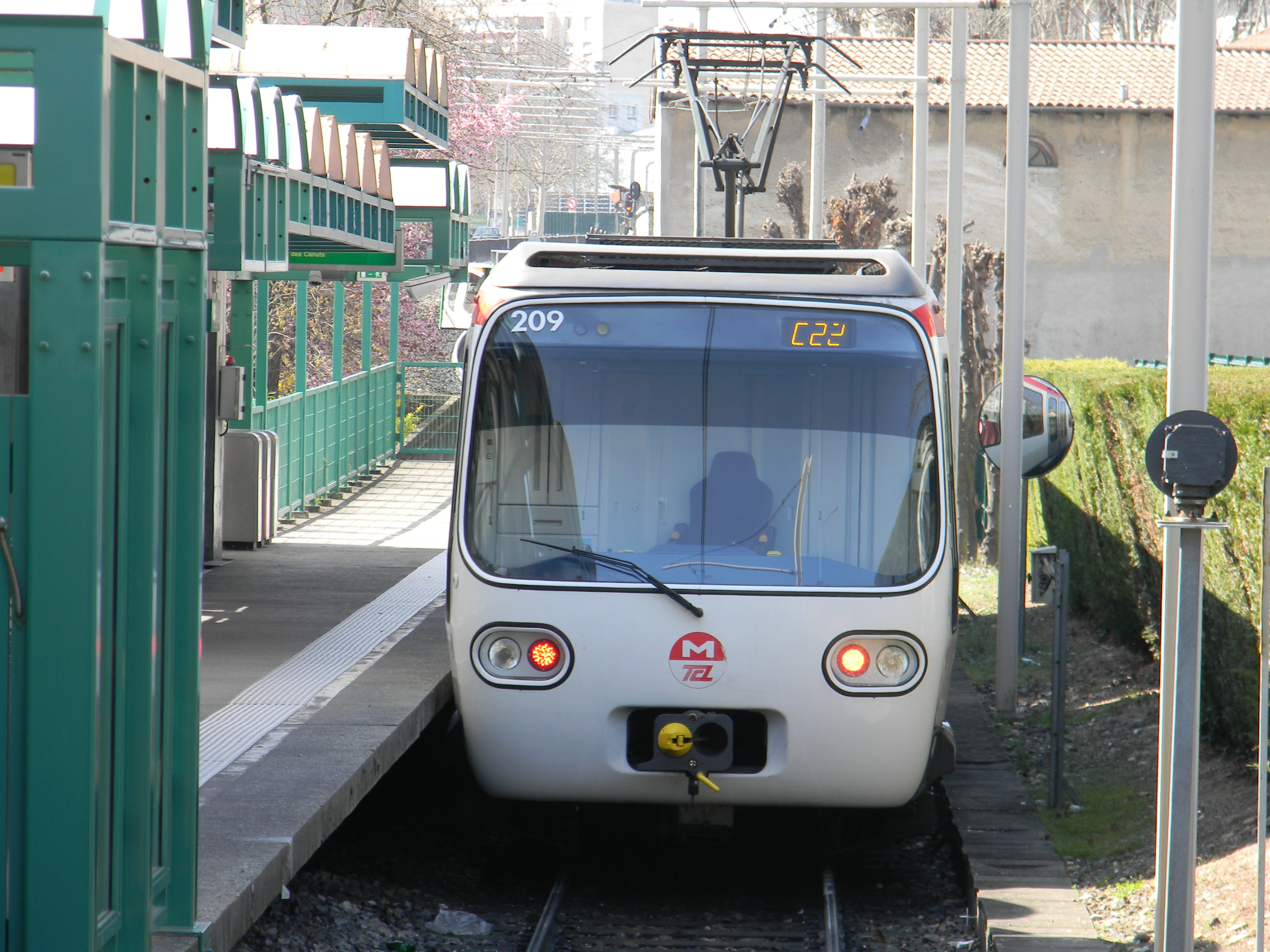 Métro ligne C des TCL à Cuire